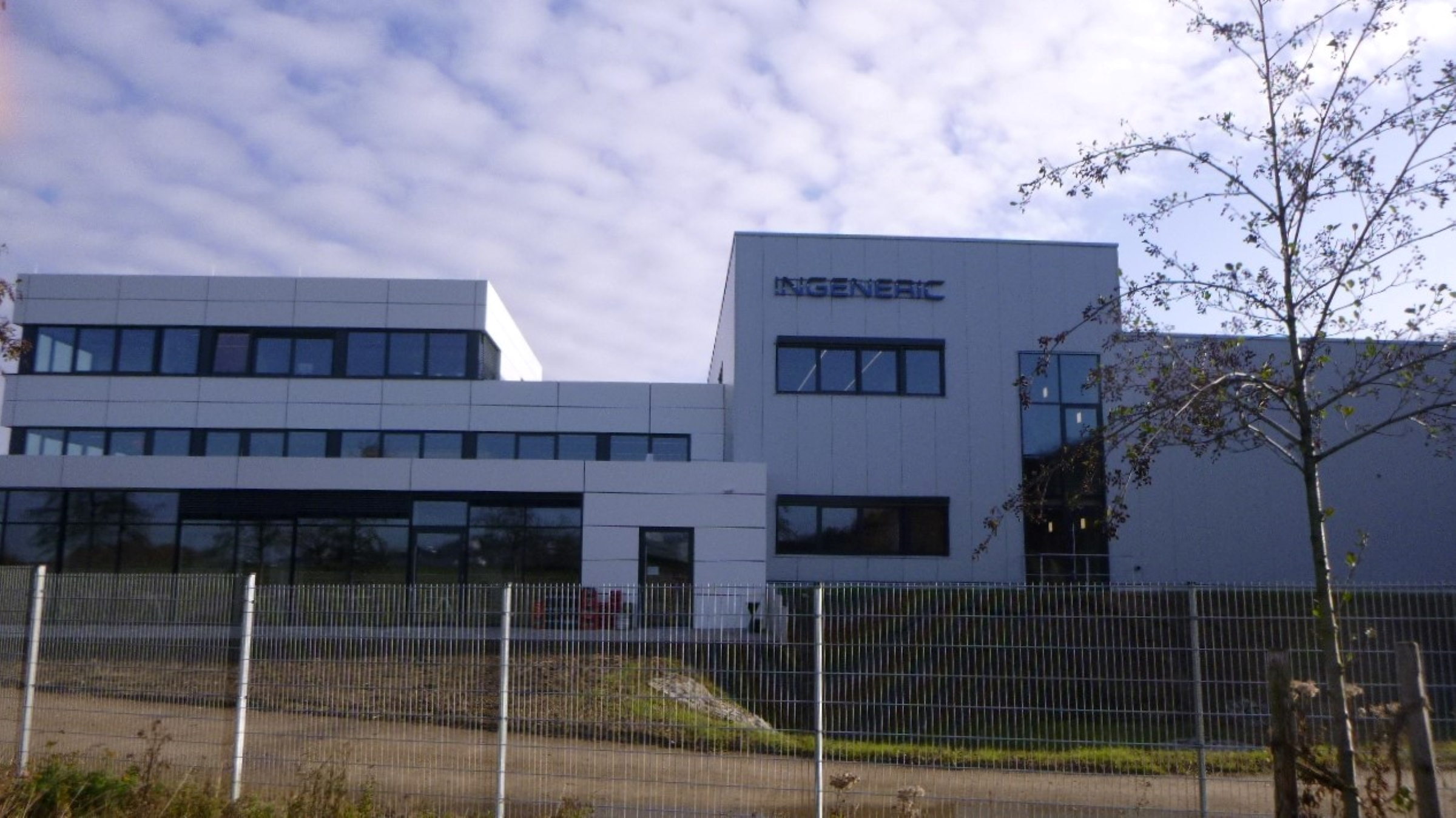 Unternehmensstandort der Tochter INGENERIC in Baesweiler bei Aachen.